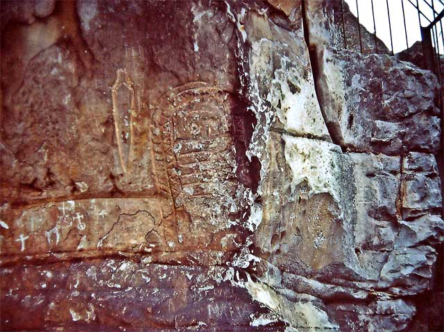 Idolo rupestre de la Peña Tú, en Puertas de Vidiago, Asturias